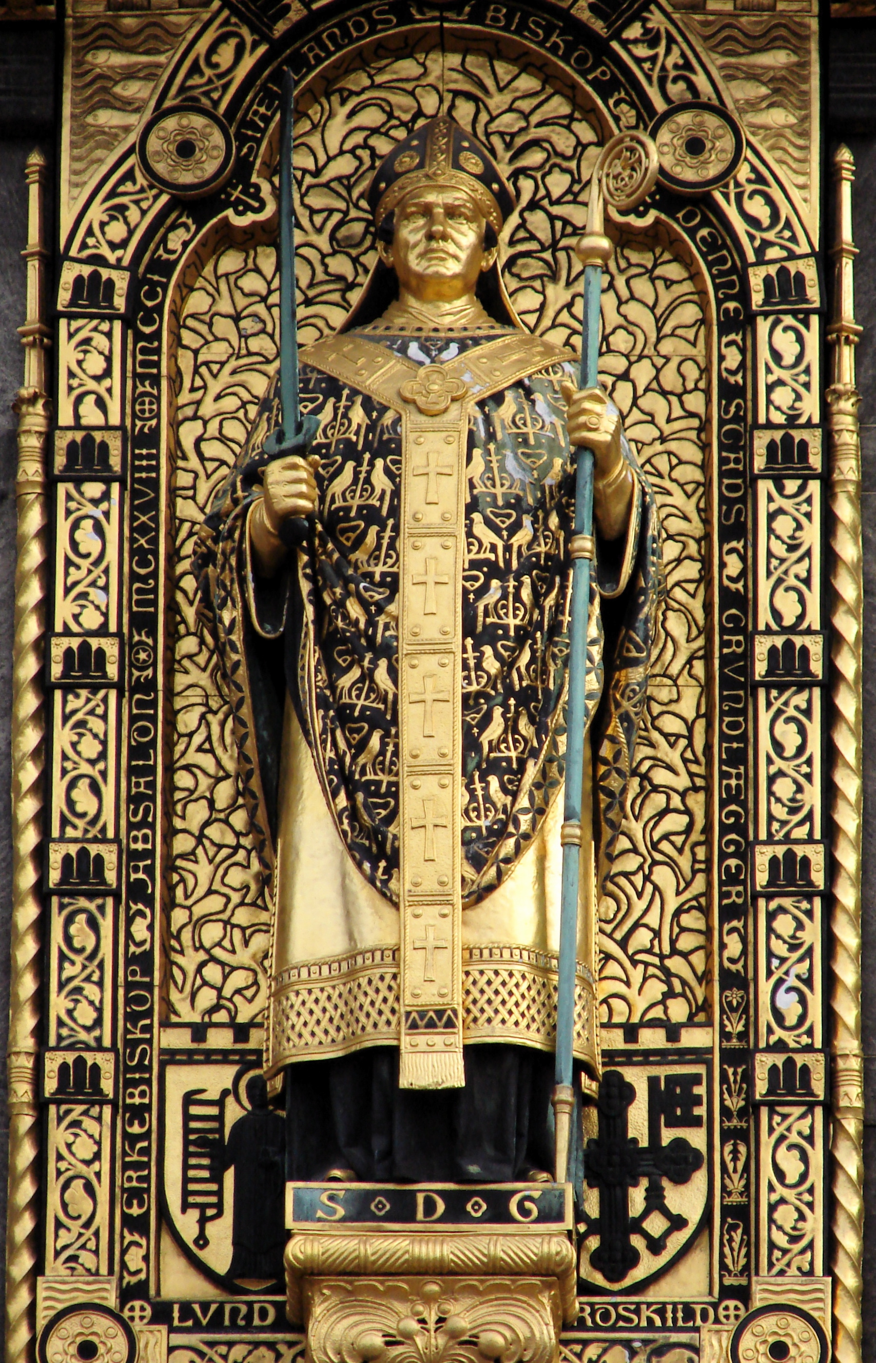 Absalon på Københavns Rådhus' facade af Vilhelm Bissen (1836-1913), København